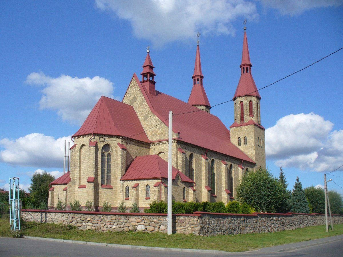 Зэльва. Касцёл Святой Тройцы